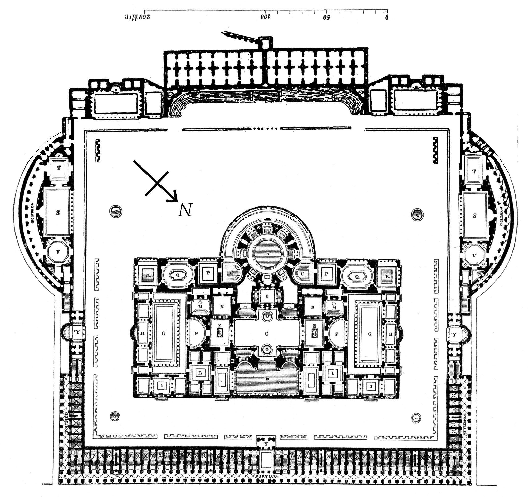 Rekonstruierter Grundriss der Caracalla-Thermen. Quelle: Wilhelm Lübke, Max Semrau: Grundriß der Kunstgeschichte. Paul Neff Verlag, Esslingen, 14. Auflage 1908.